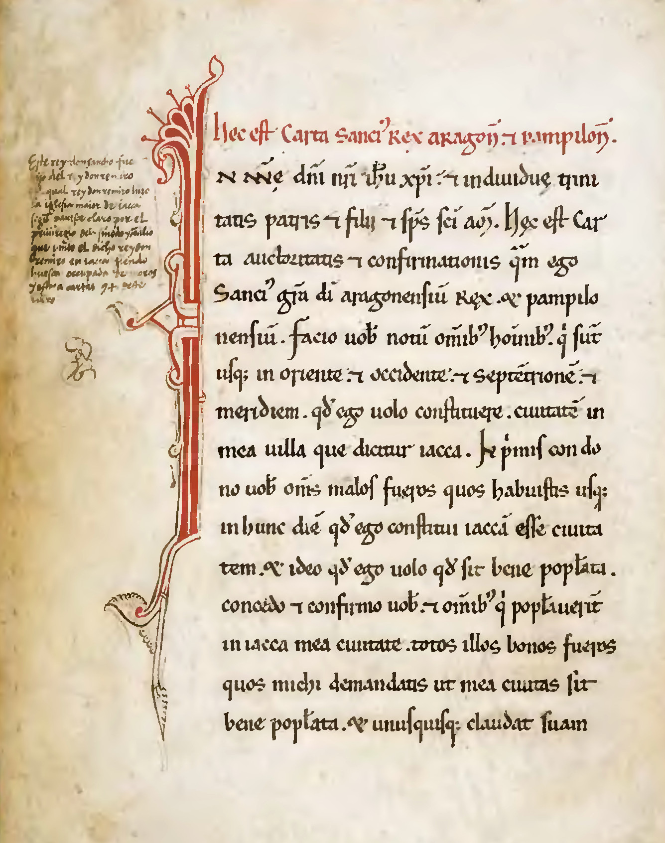 Libro de la Cadena del Concejo de Jaca. Comienzo del Fuero de Jaca. Copia del siglo XIII. Ayuntamiento de Jaca. Archivo Municipal.